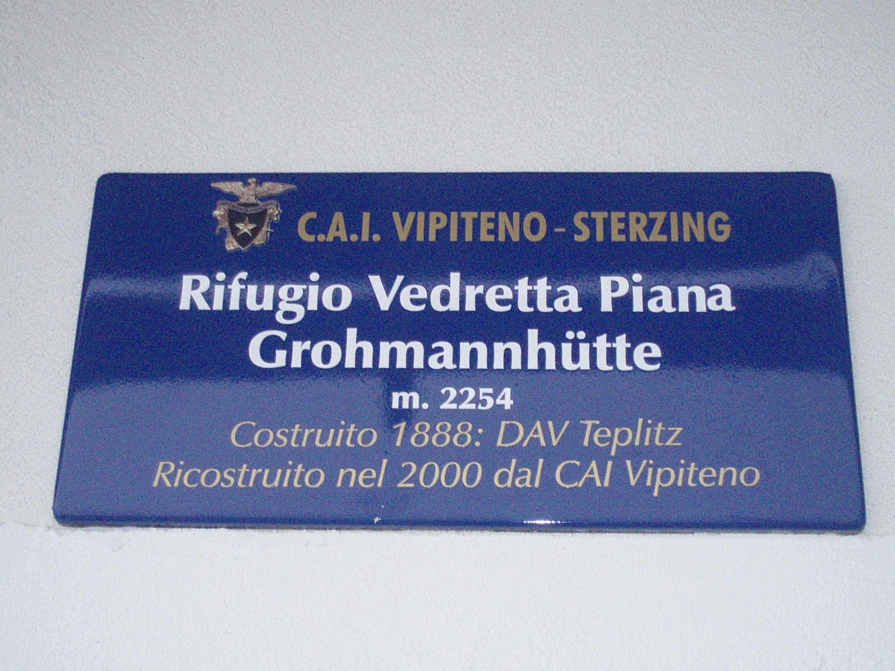 Schild an der Grohmannhütte